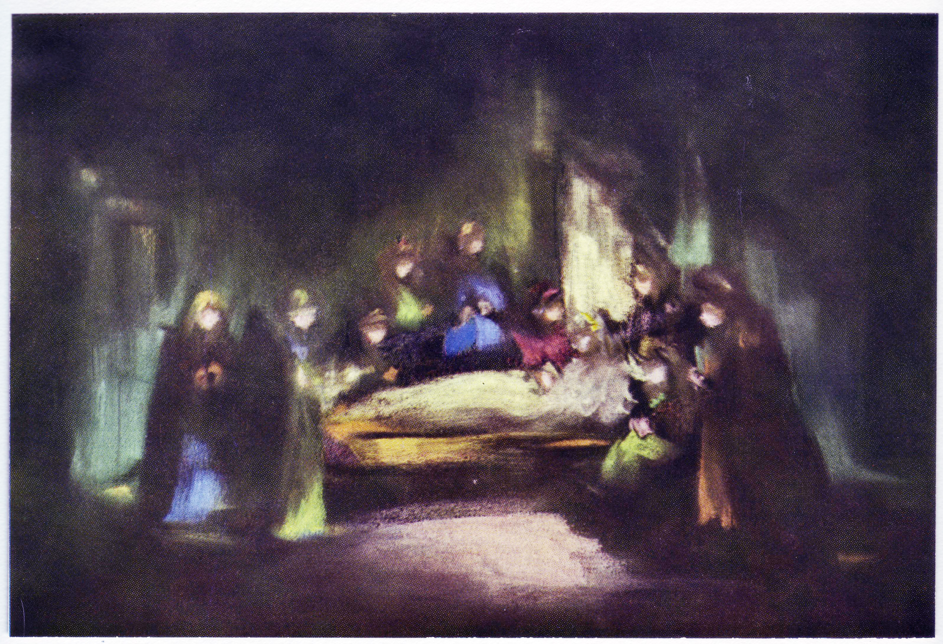 Last_momments.jpg רישיון נוצר על ידי משתמש:האמן